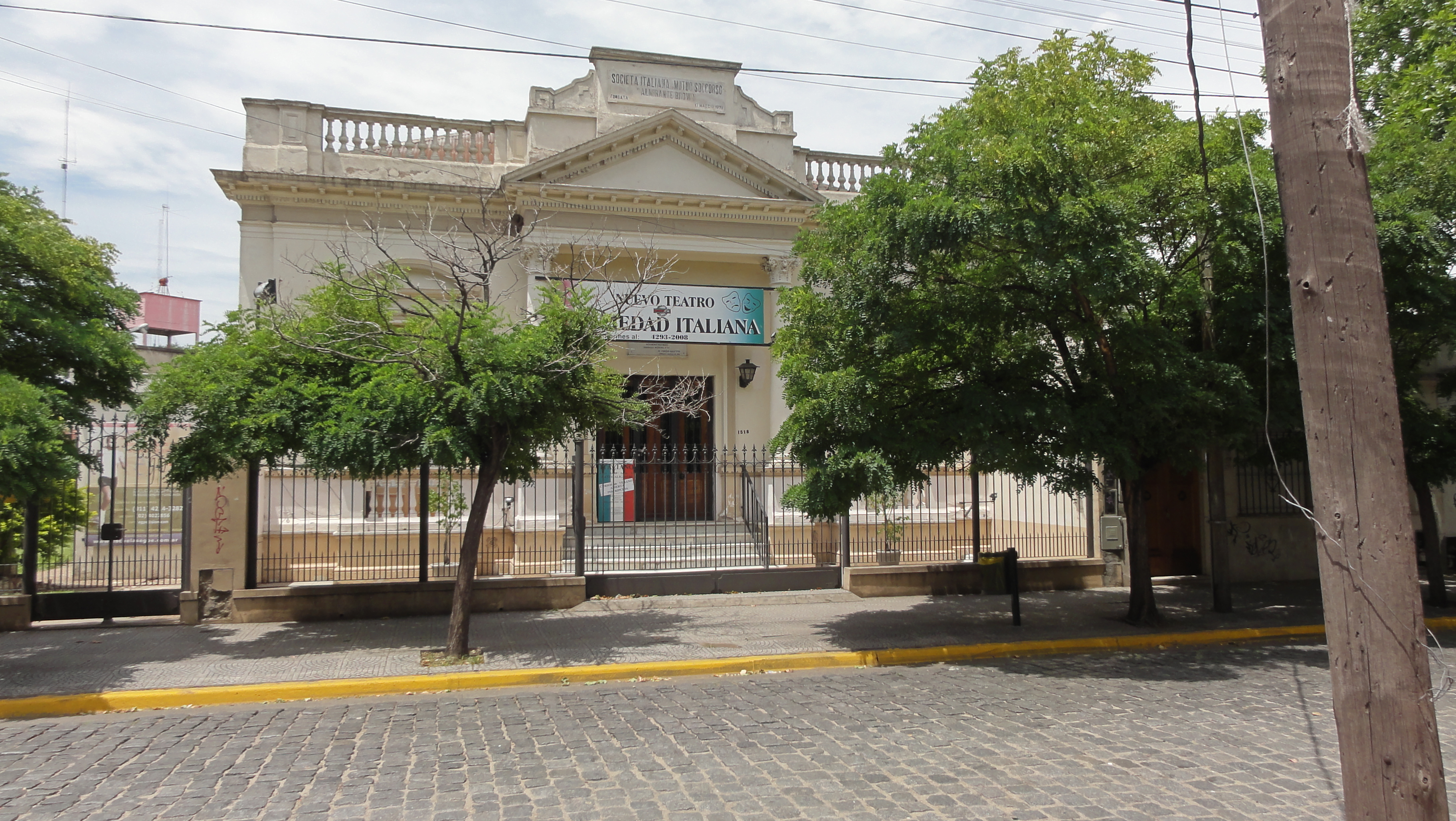 Ubicado en la calle Leonardo Rosales, Adrogué